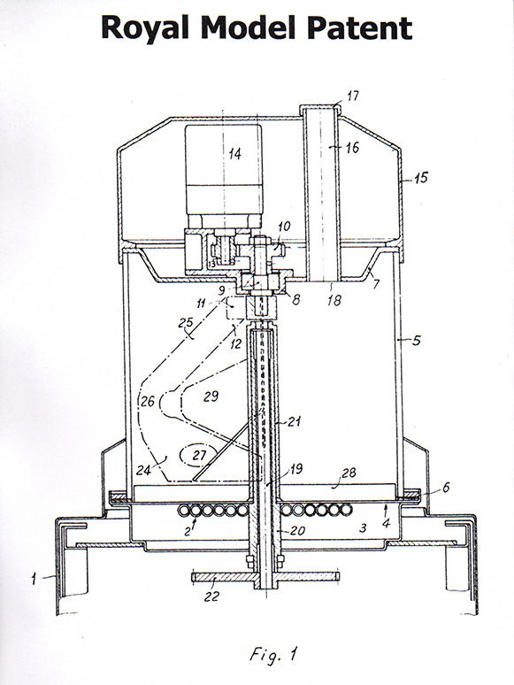 La fotostoria della Elmaco